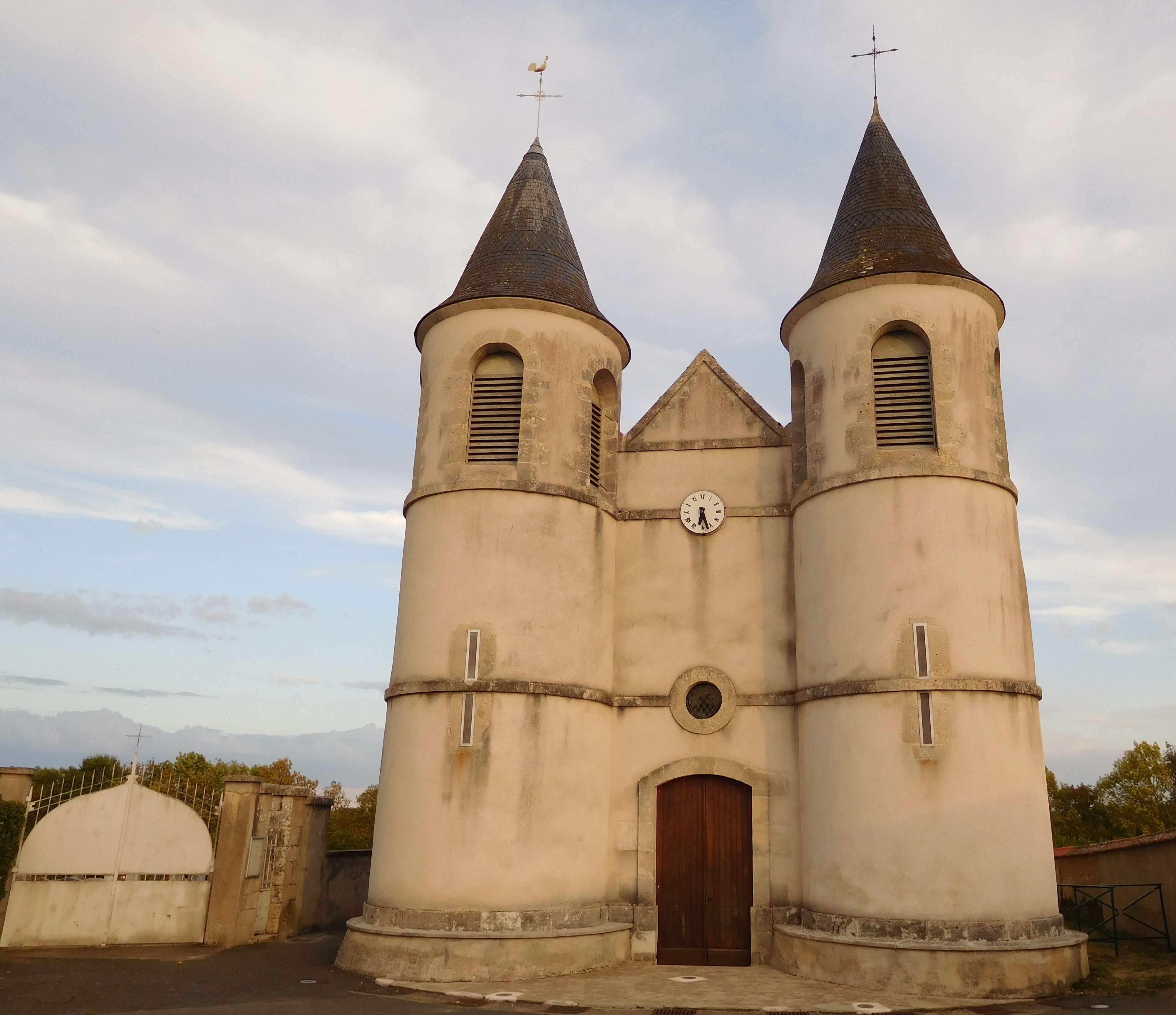 Église Saint-Julien, Bannay, Cher, France.